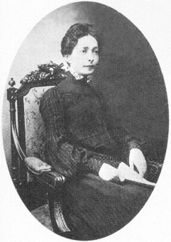 Retrato de Fenia Chertkoff